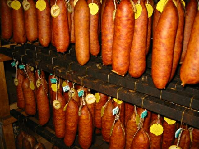 Saucisse de Morteau fumée - Franche Comté